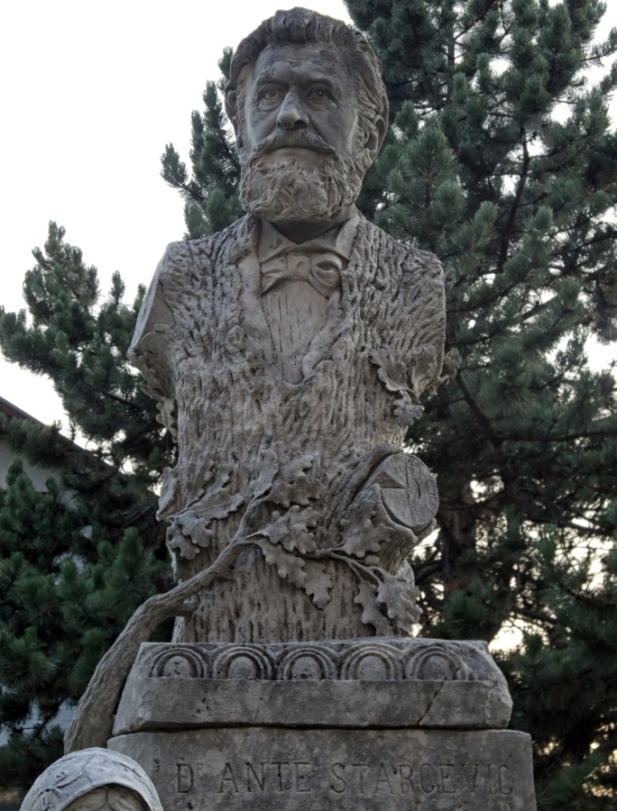 Spomenik Anti Starčeviću, rad Ivana Rendića